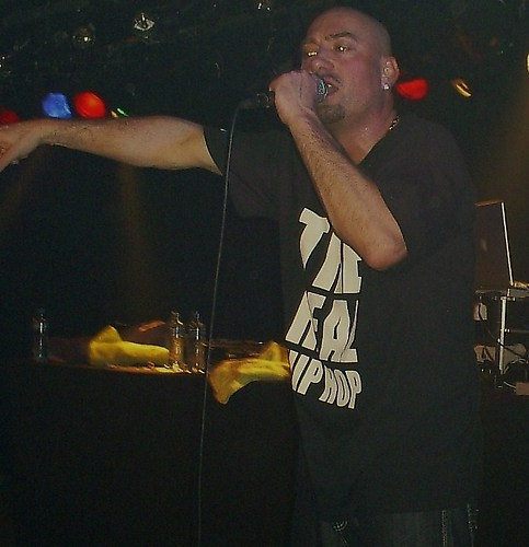 De foto is gemaakt op 21 maart 2008 tijdens een show dat deel uitmaakt van de albumtour van Extince's CD "Toch?", in het Burgerweeshuis te Deventer.